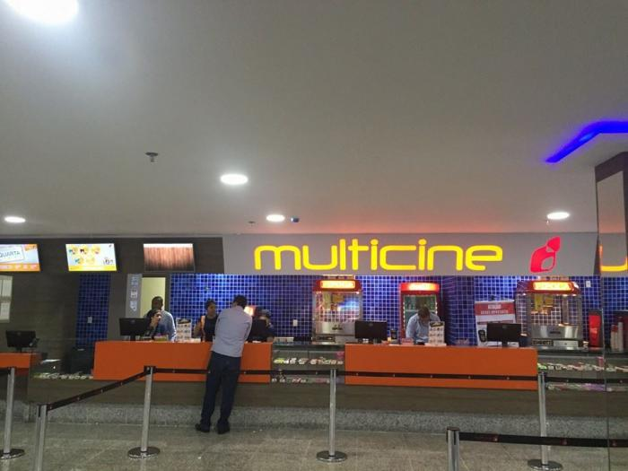 Bomboniére do Multicine do Shopping Santa Maria, DF